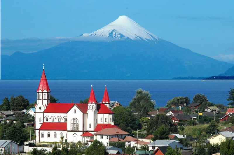 Puerto Varas mit Lago Llanquihue und Vulkan Osorno Sonstiges: ..